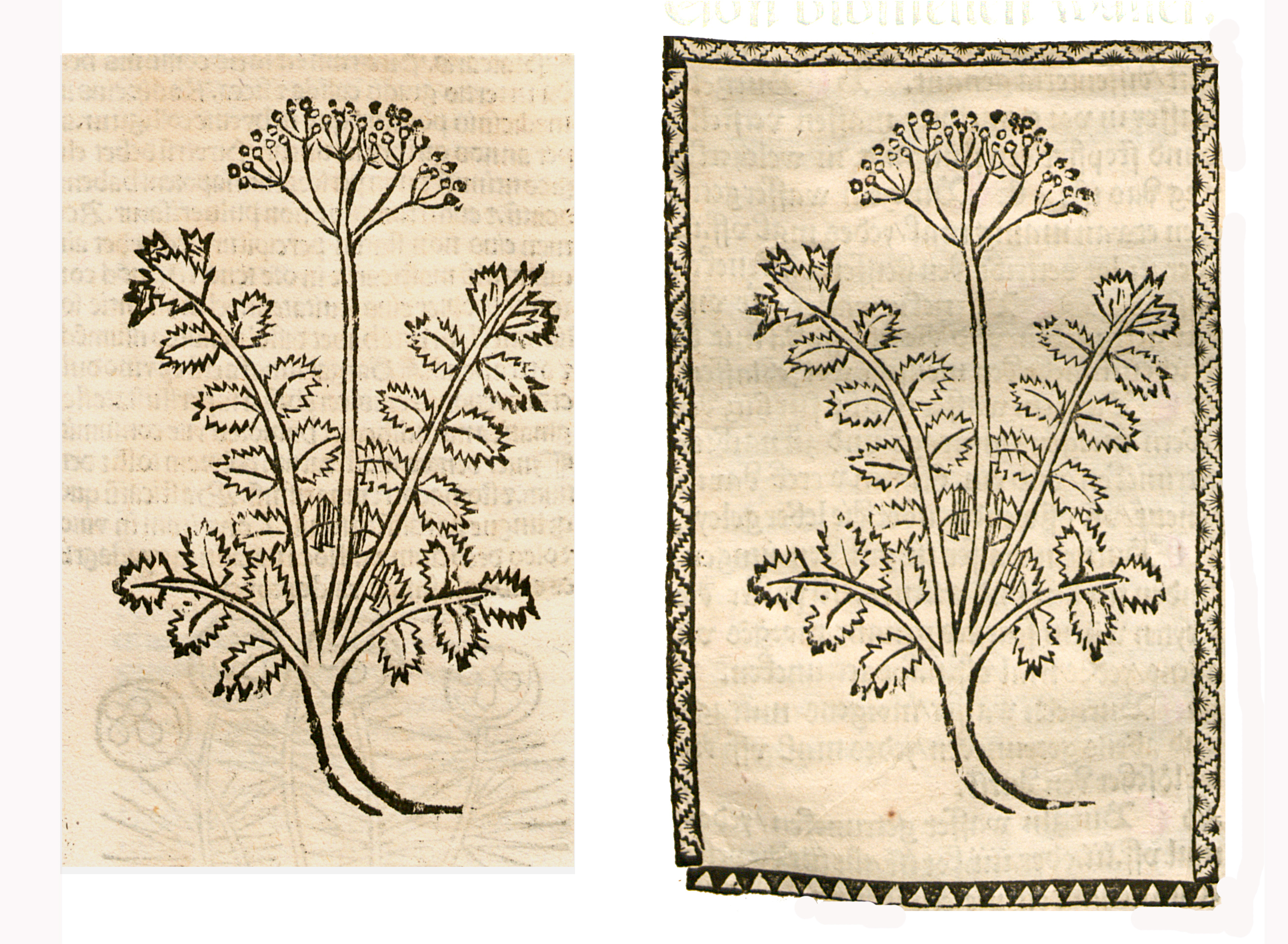 Abbildung von: Bibernellen